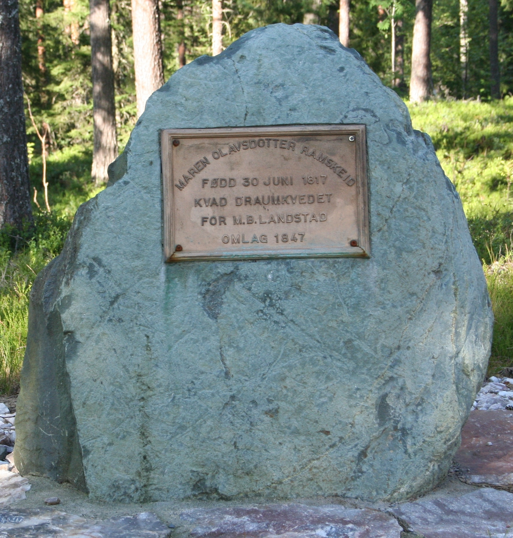 Minnestein for Maren Ramskeid, Åsgrend